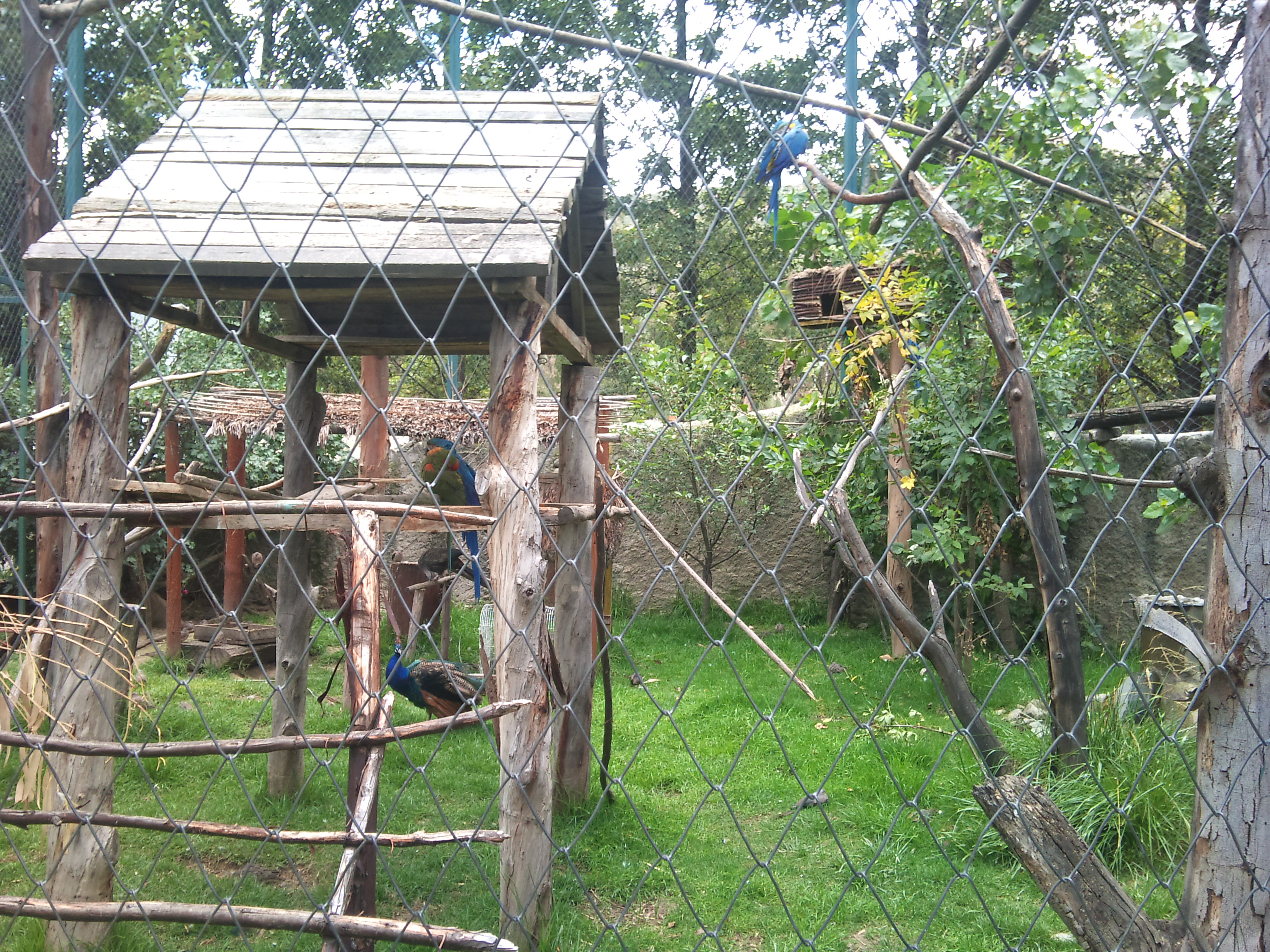 fotos de Bolivia